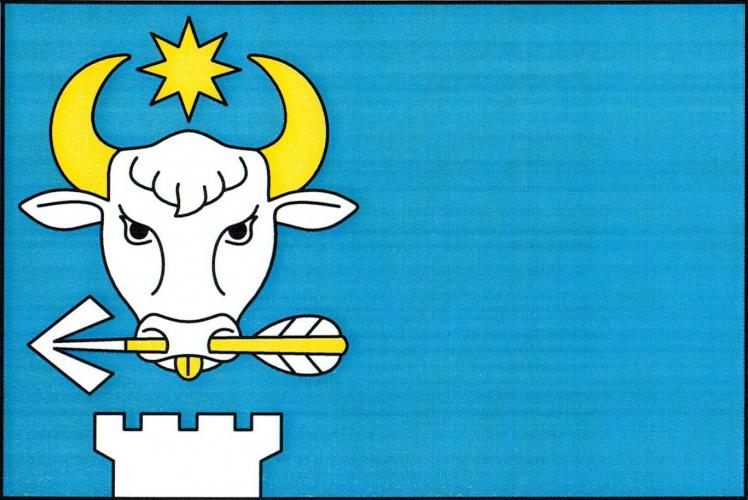 vlajka Radovesnice I